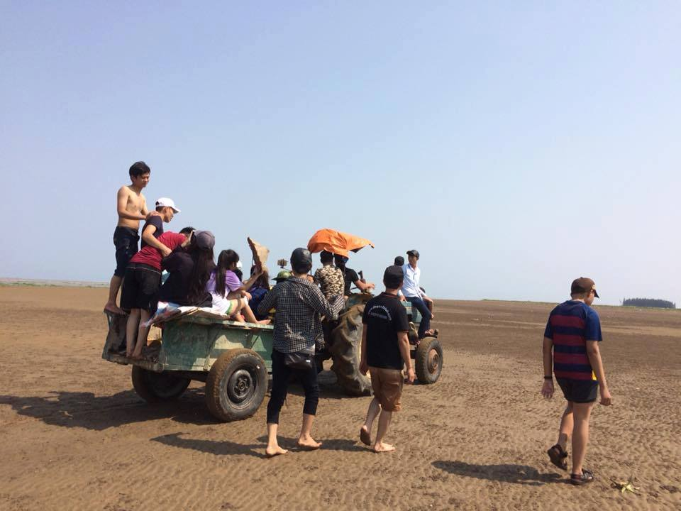 Du lịch Cồn Nổi Ninh Bình